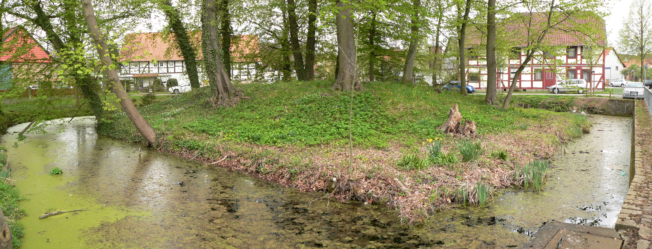 Burg Adersheim